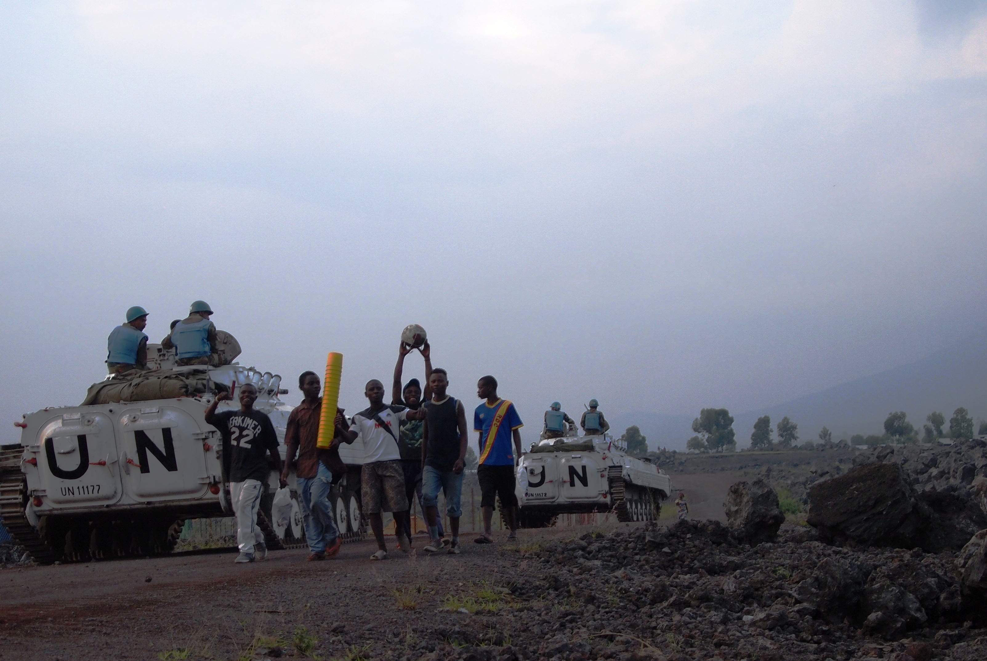 MONUSCO peacekeepers of the North Kivu brigade on patrol in a street of Goma pass a group of teenagers returning from a football game. 4 January 2014. Photo: MONUSCO/North Kivu Brigade. Des casques bleus de la brigade du Nord Kivu de la MONUSCO en patrouille dans une rue de Goma croisent un groupe de jeunes en provenance d’un match de football. 4 janvier 2014. Photo : MONUSCO/Brigade du Nord Kivu.